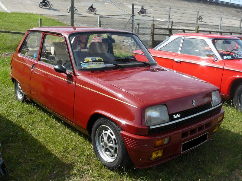 Montlhery 2012